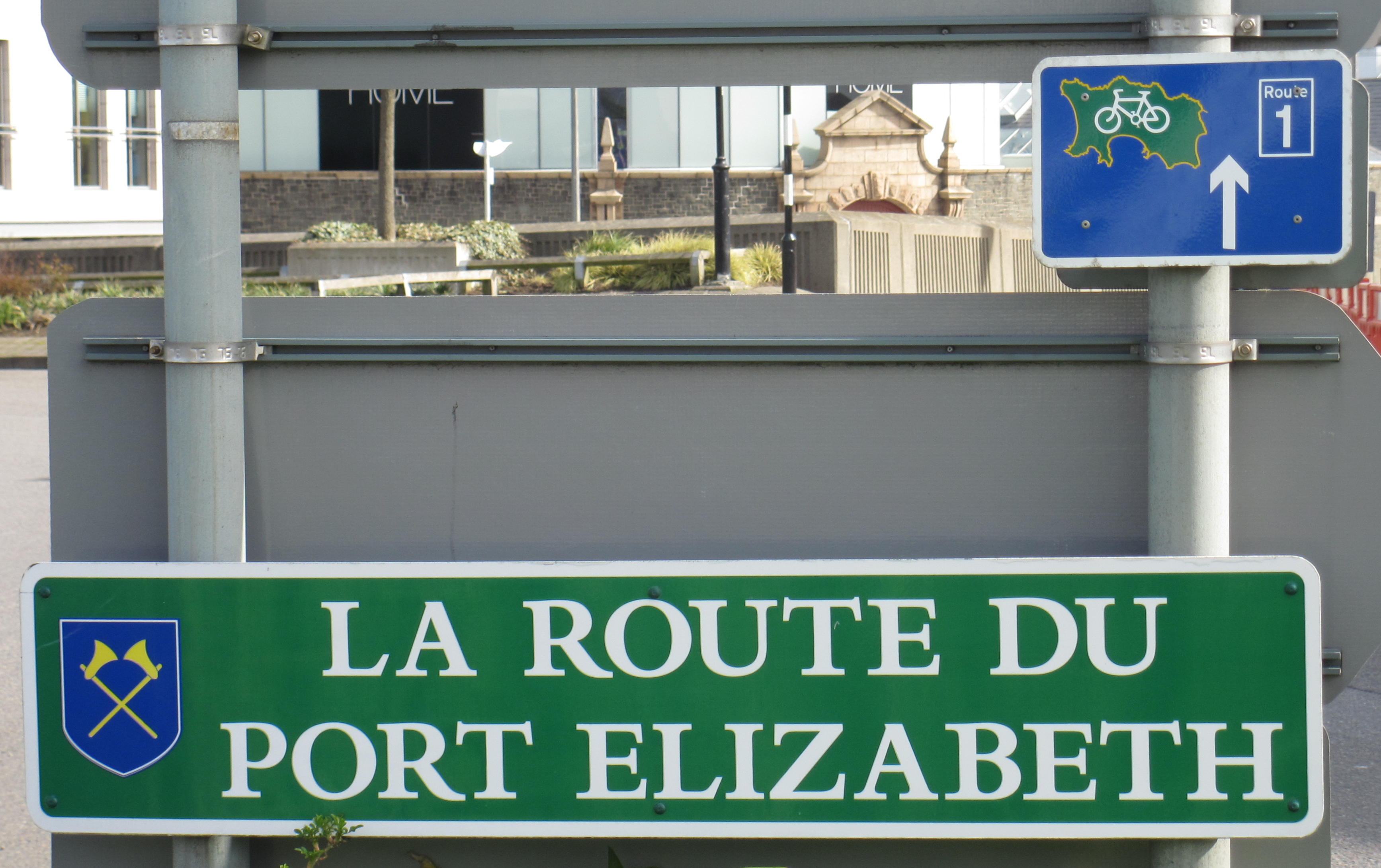 La Route du Port Elizabeth